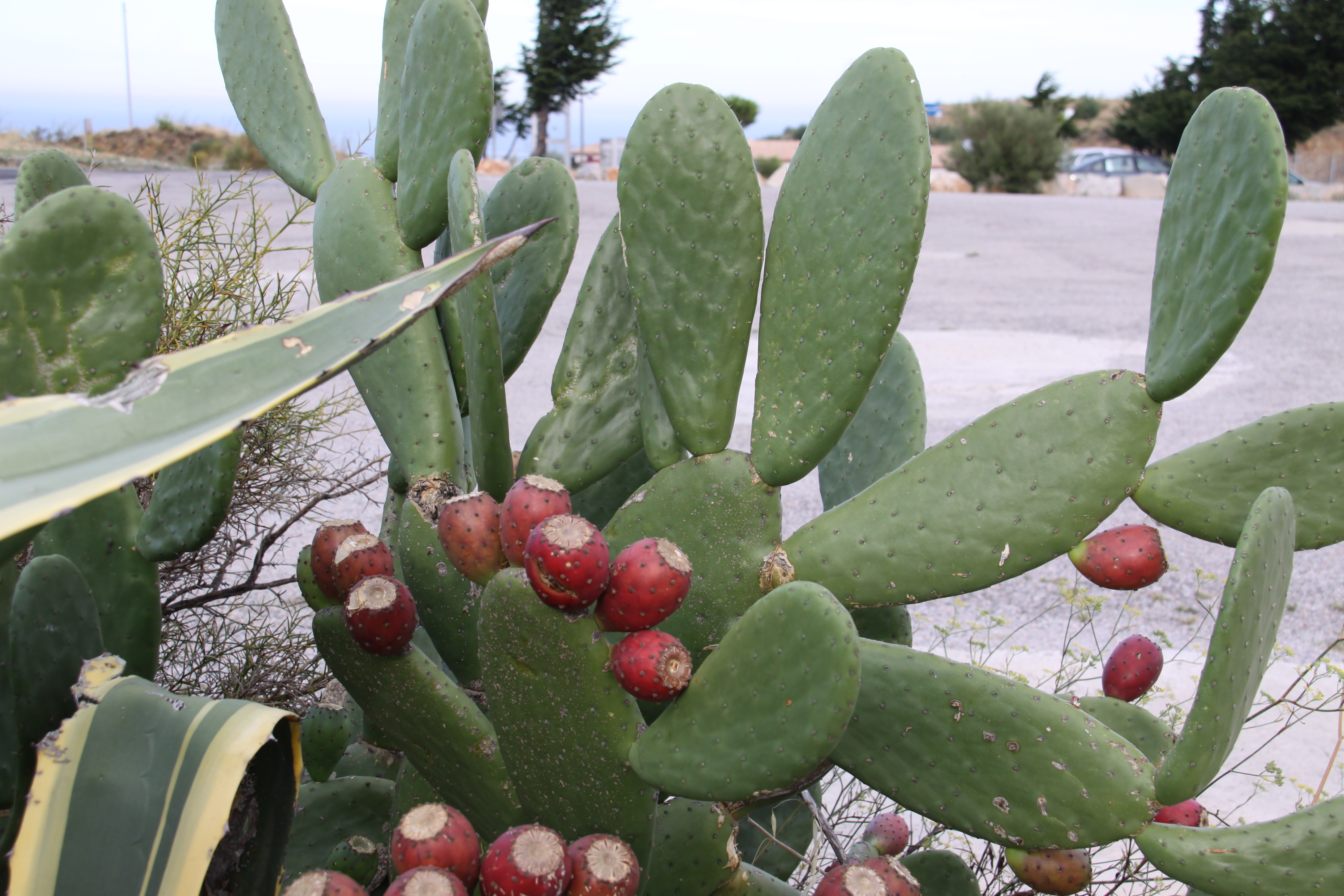 Un figuier de Barbarie avec de grandes cladodes (raquettes). Près de Cerbère, Pyrénées-Orientales, France.